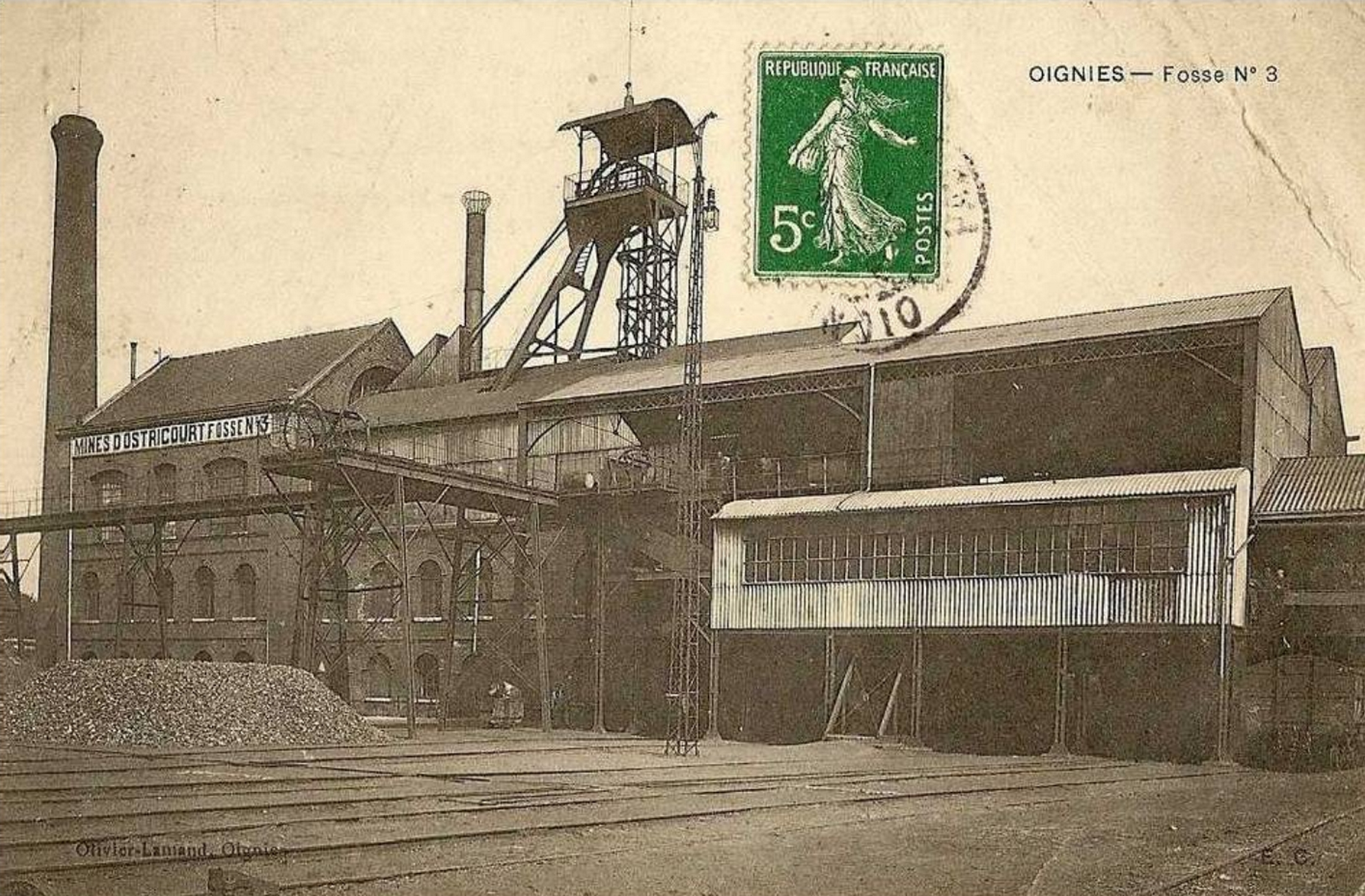 La Fosse n° 3 de la Compagnie des mines d'Ostricourt était un charbonnage constitué d'un seul puits situé à Libercourt, Pas-de-Calais, Nord-Pas-de-Calais, France.